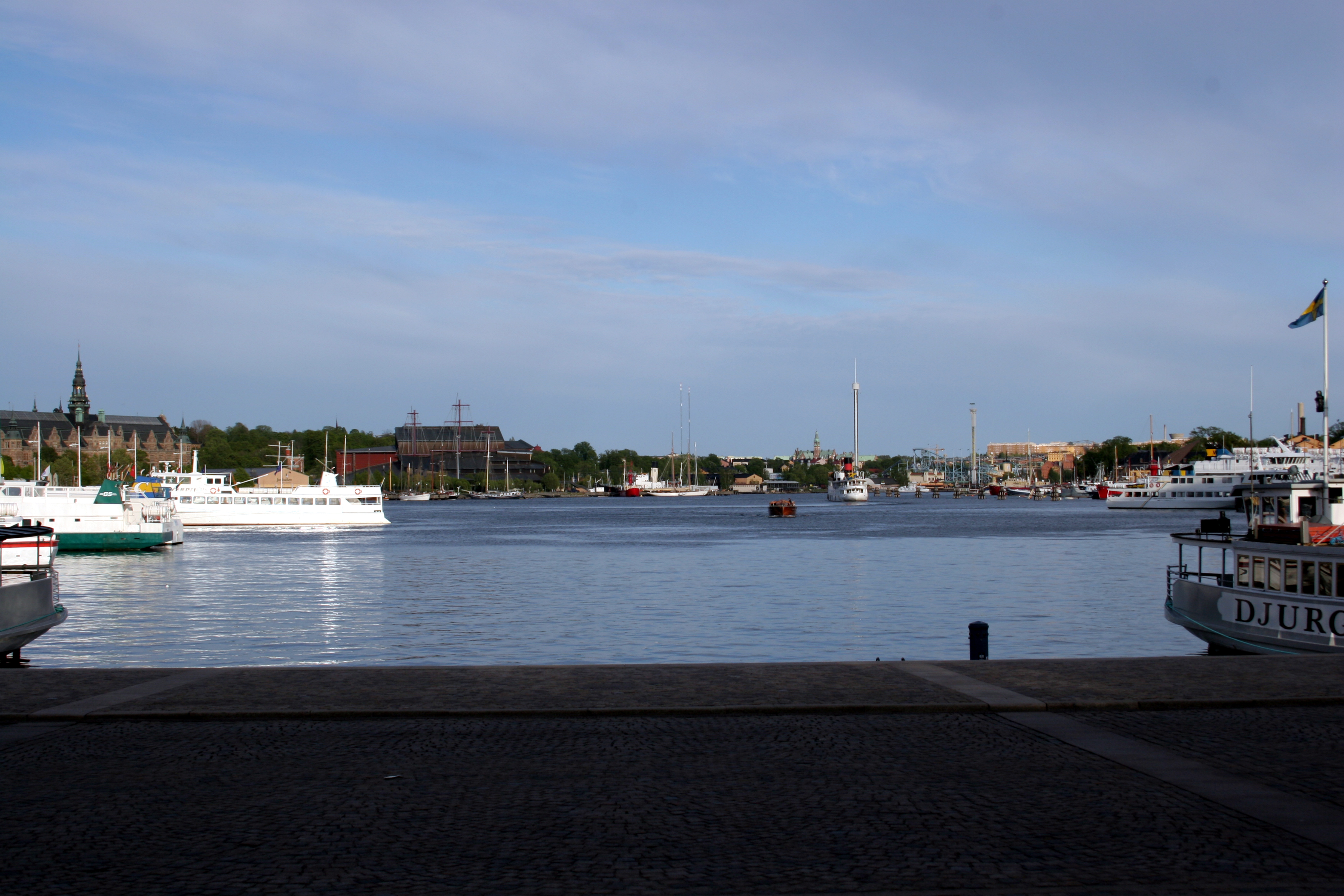 Nybroviken, Stockholm. Picture taken from Raoul Wallenbergs torg.